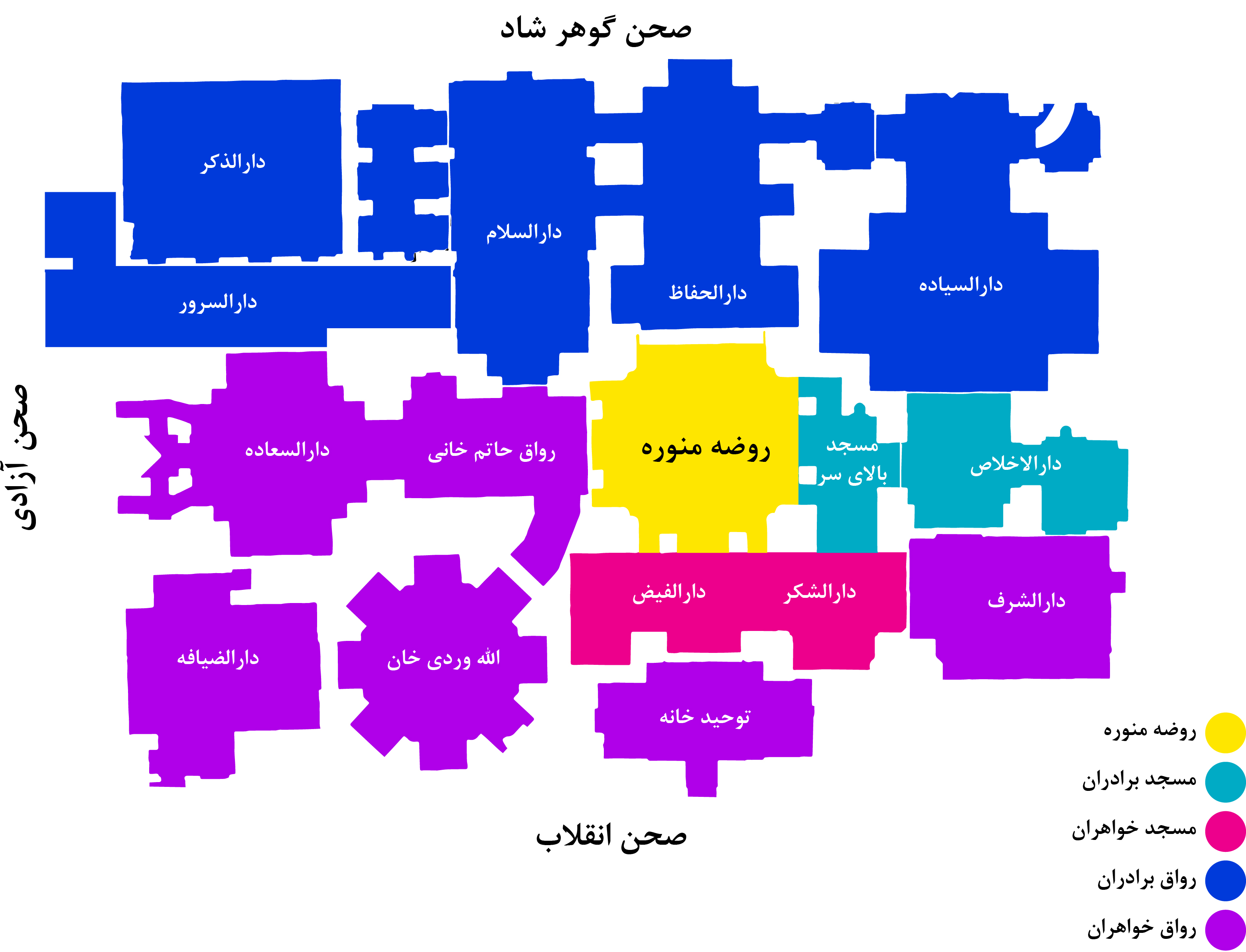 نقشه داخل حرم امام رضا